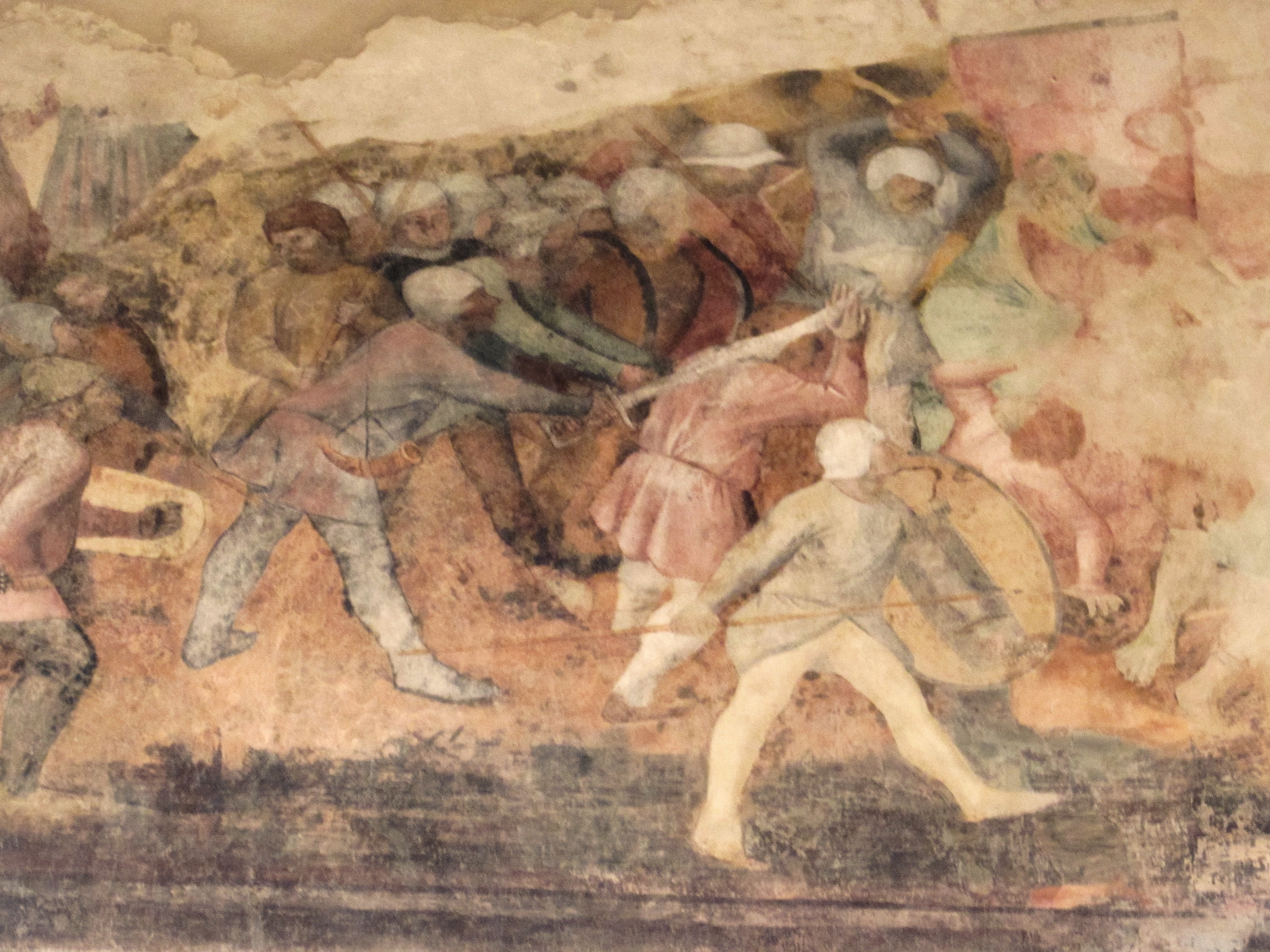 Rocca Malatestiana This is a photo of a monument which is part of cultural heritage of Italy.